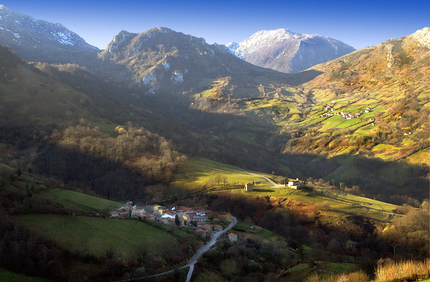 Pedroveya /Quiros(Asturias)